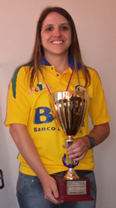 Liliane Silva - técnica da seleção brasileira feminina e o troféu do pré mundial feminino de futebol de salão AMF.